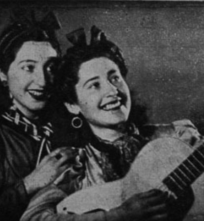 Las hermanas Loyola dúo folclórico chileno compuesto por las hermanas Estela Loyola (izquierda) y Margot Loyola en 1942.